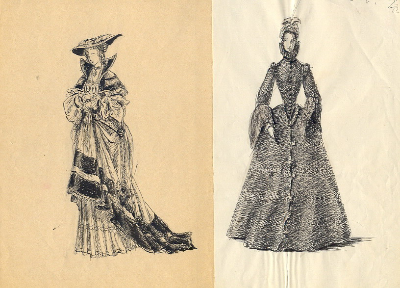 Rimanóczy Yvonne főiskolai tanulmánya